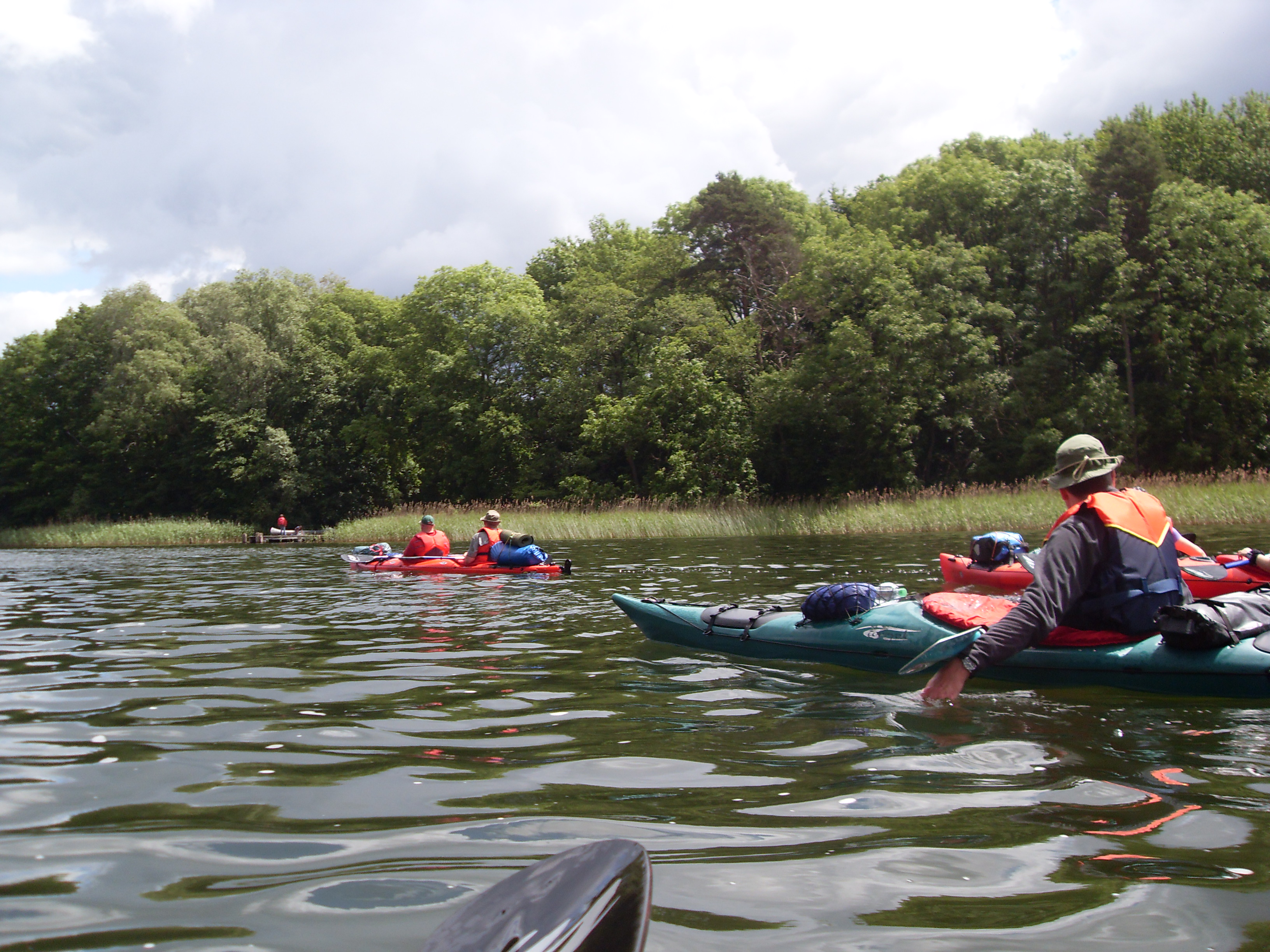 Der Canower See liegt in der Mecklenburgischen Seenplatte 11 Kilometer südöstlich von Mirow und 10 Kilometer südlich von Wesenberg im Süden Mecklenburg-Vorpommerns, an der Grenze zu Brandenburg; diese verläuft am Südufer des Sees.